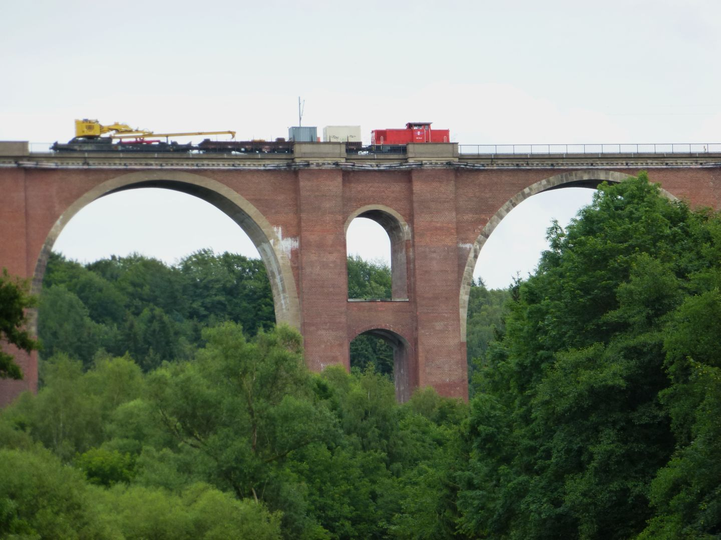 Elstertalbrücke